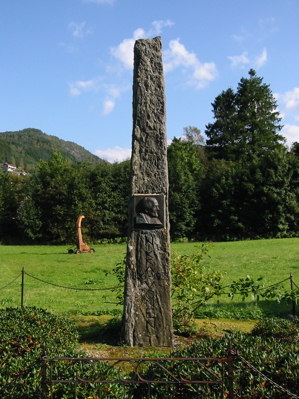 Minnestøtte over Nikka Vonen ved vonen sitt "Pigeinstitutt" i Dale i Sunnfjord. Foto Arild Nybø